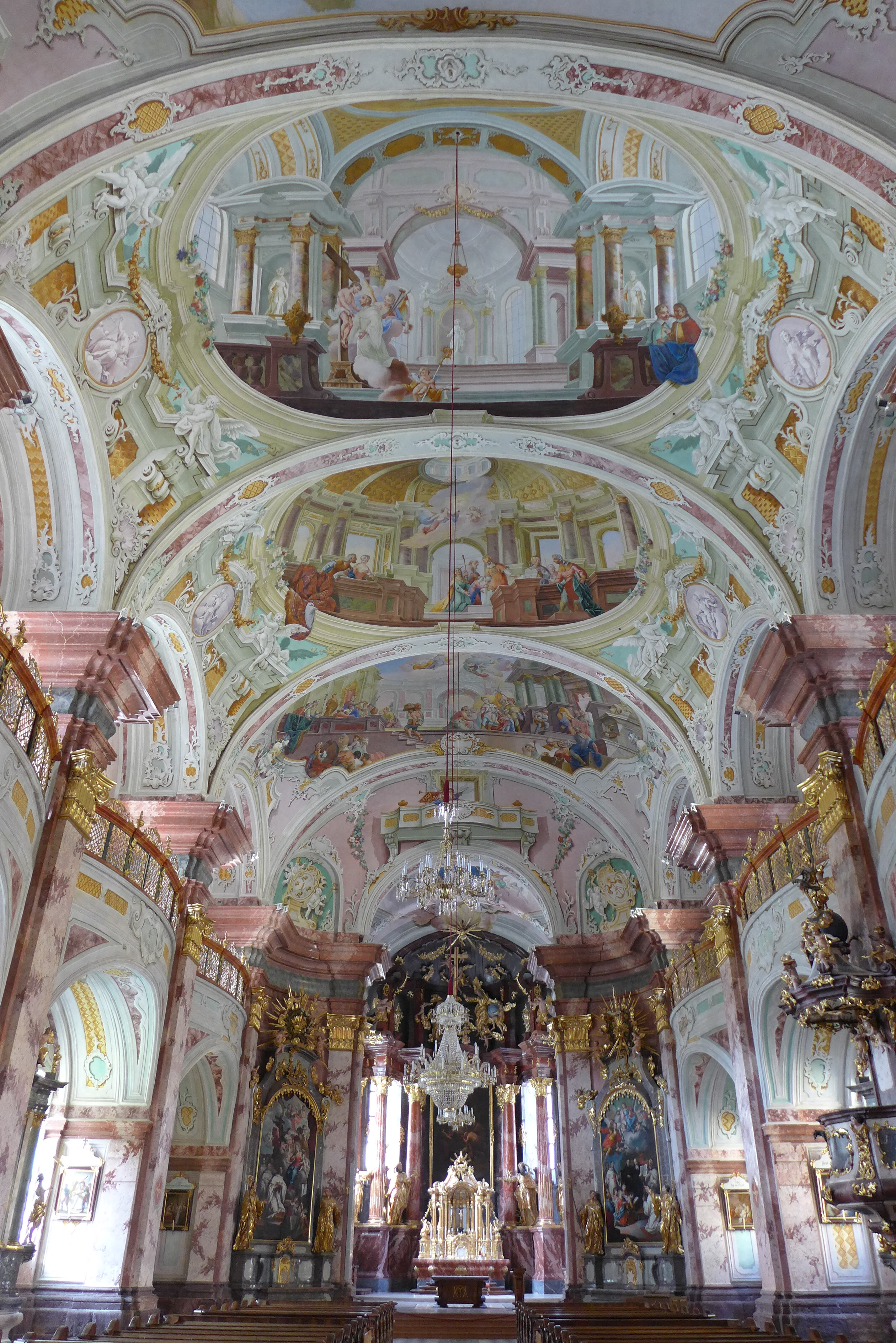 Stiftskirche Rein - Innenraum 2